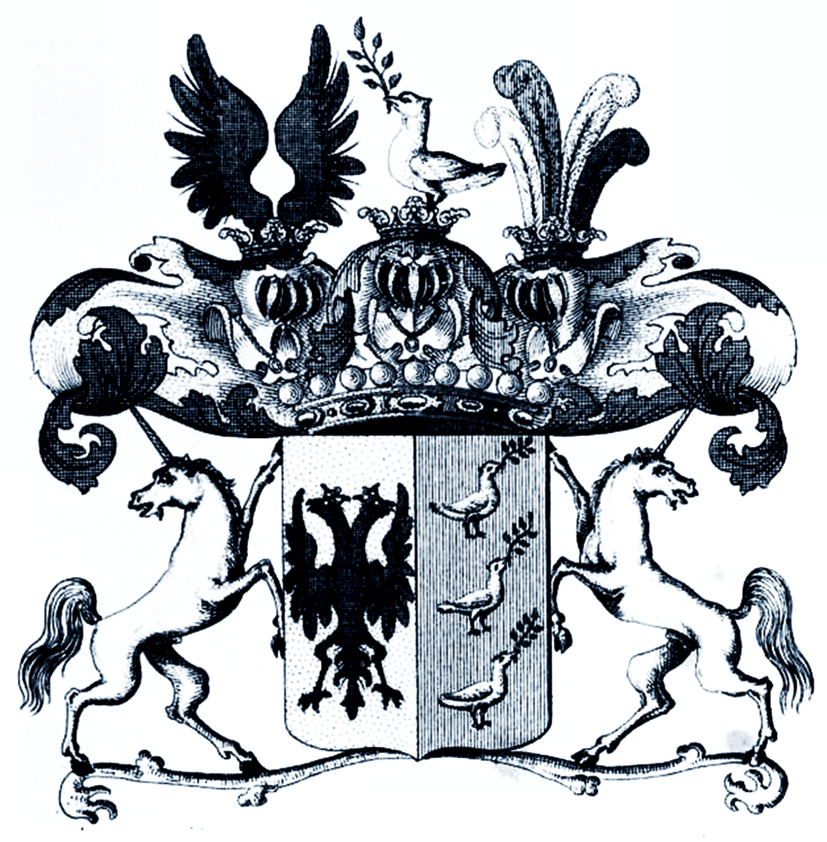 Wappen der Grafen Pace von Friedensberg (erstmalig 1690) nach Tyroff